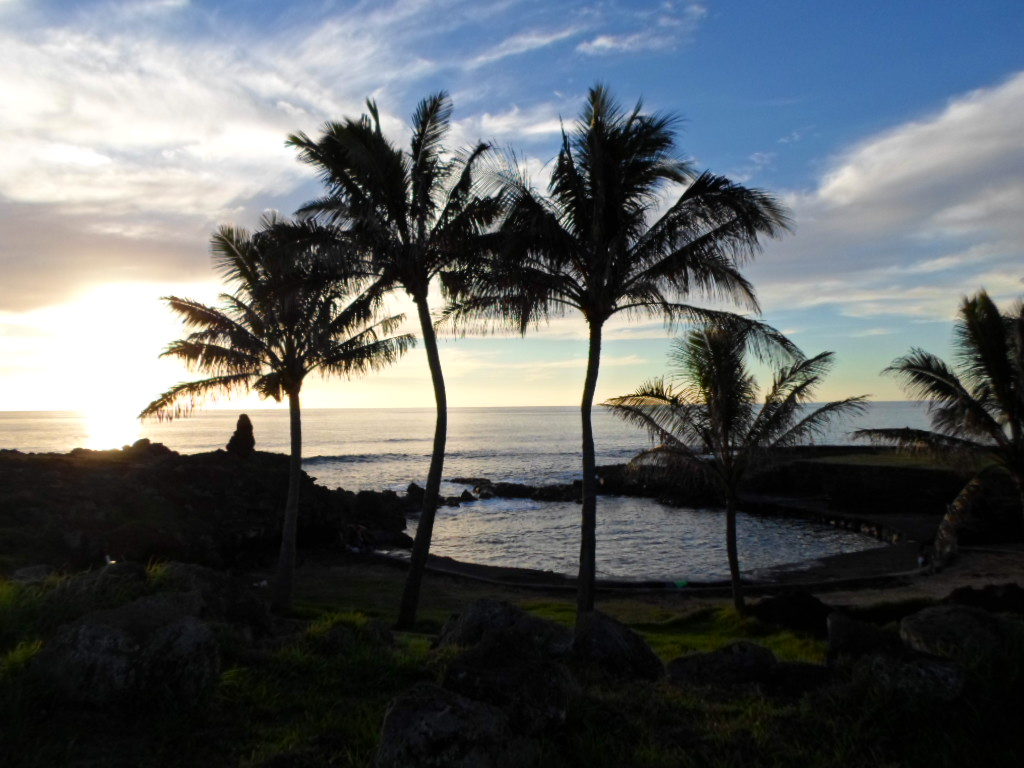 Isla de Pascua, camino a Tahai This is a photo of a national monument in Chile: 628